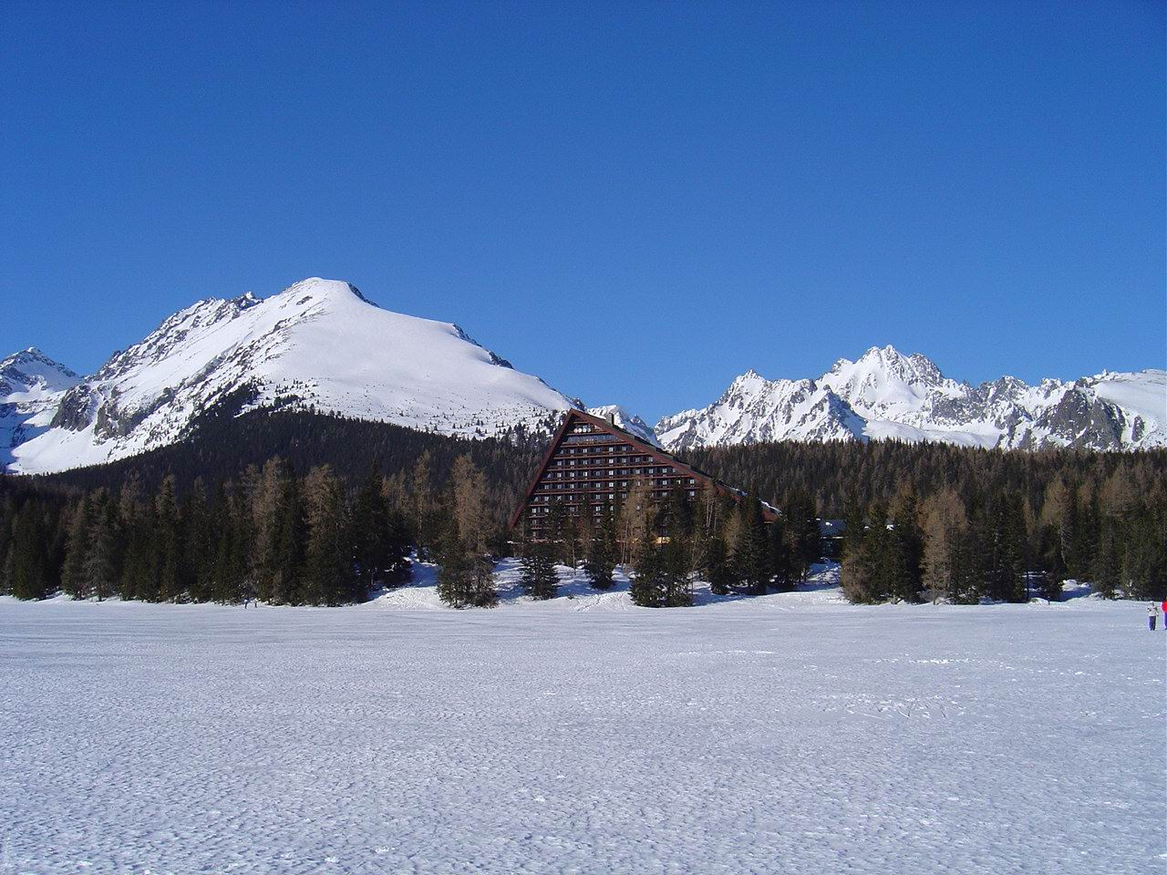 Foto urobil 20.03.2005 Kristián Slimák na Štrbskom Plese. Kategória:Obrázky budov Kategória:Presunúť_na_Commons